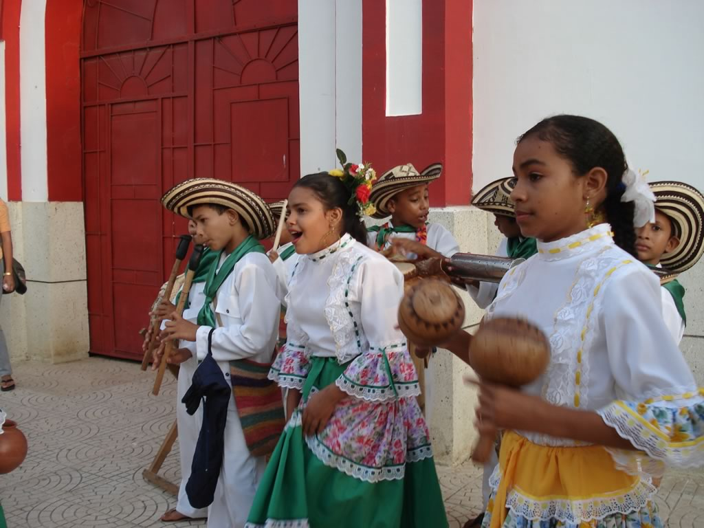 Niños Gaiteros en el Festival del Porro, Cordoba. Colombia.